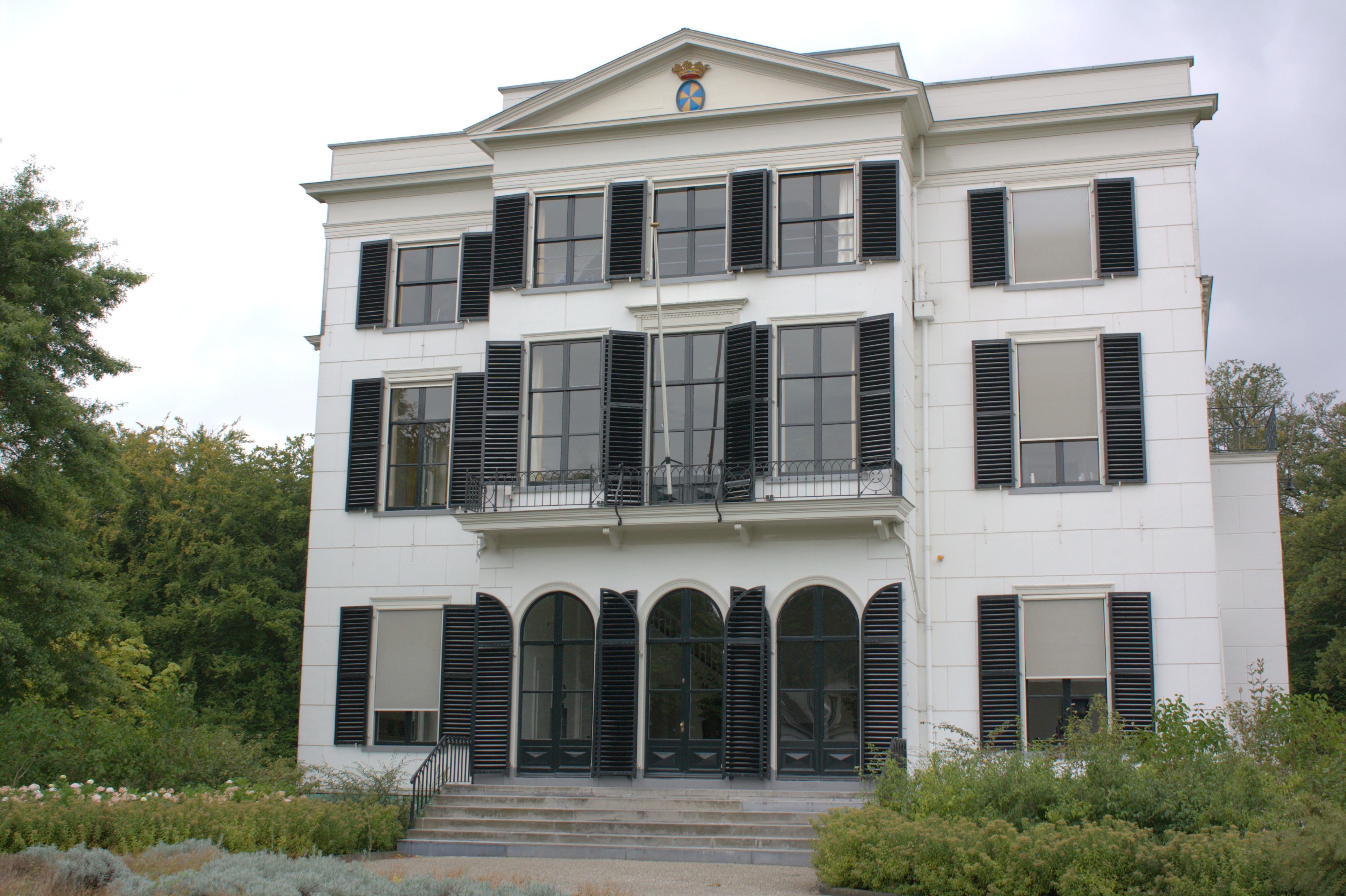 het kasteel Geerestein castle Geerestein